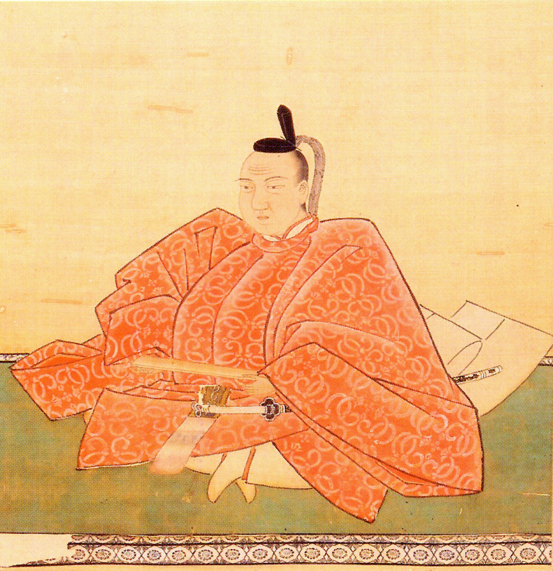 岡部長敬の肖像。